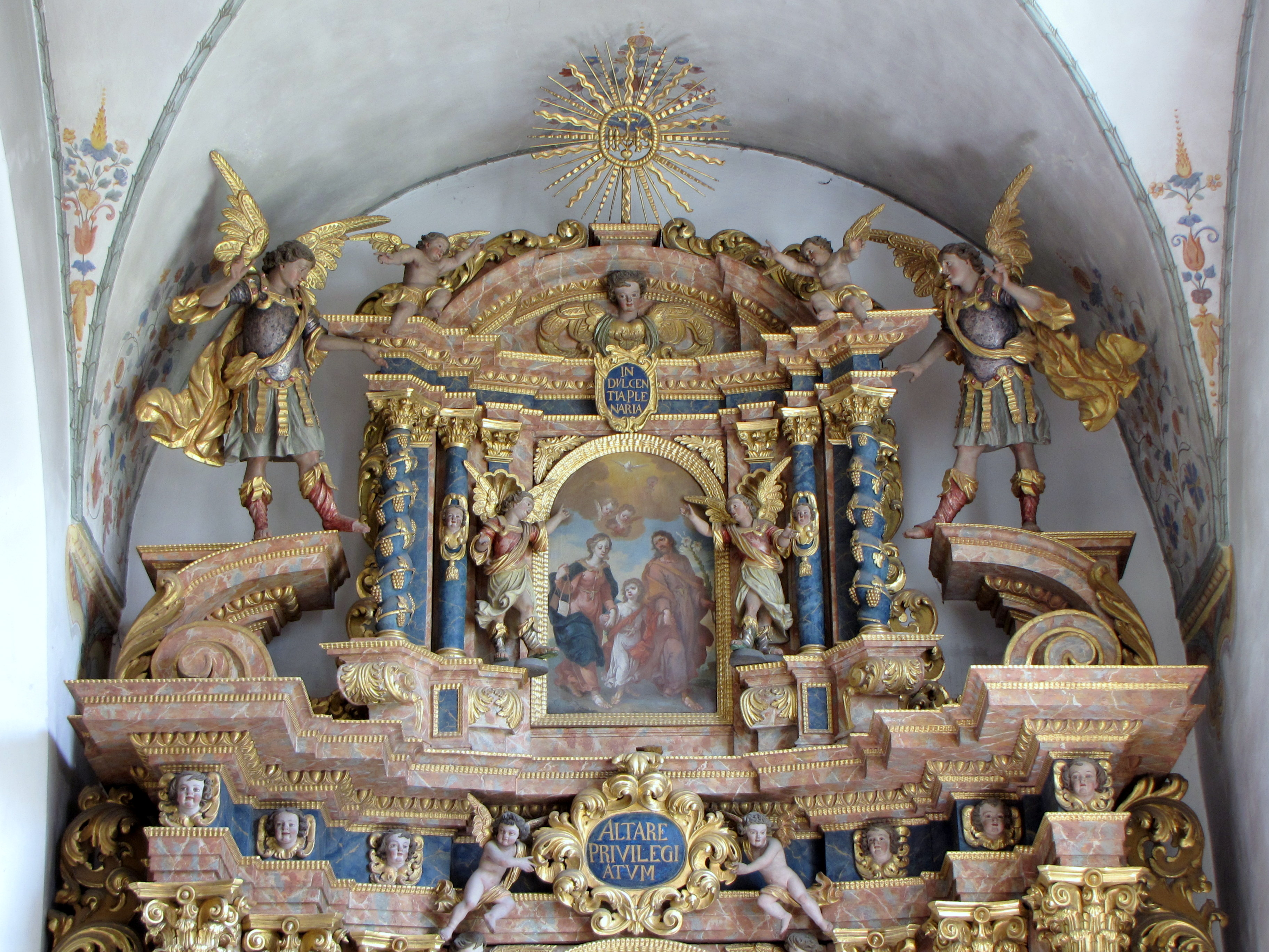 Auszug des Skapulieraltares der Wallfahrtskirche Maria Rain